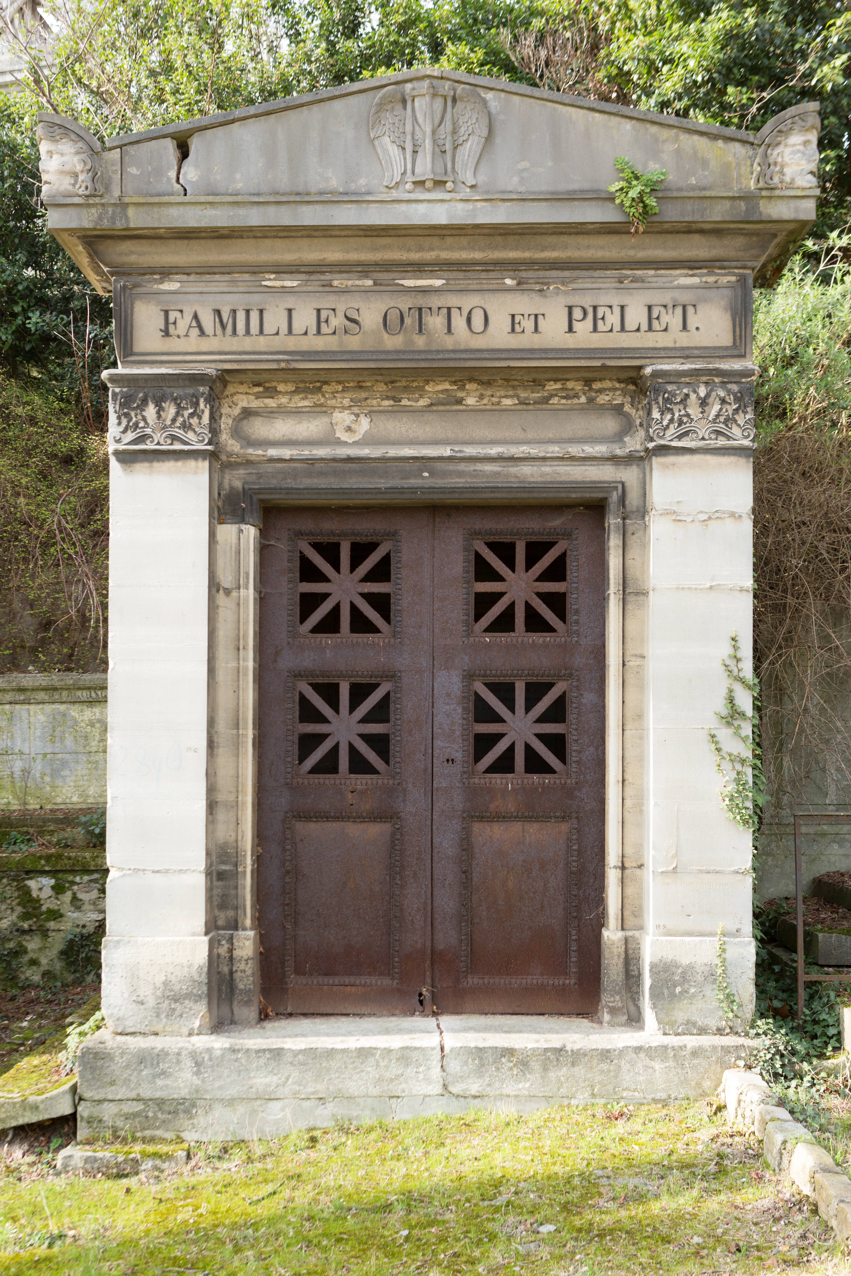 Sépulture de Louis-Guillaume Otto (1753-1817), diplomate ; Jean Pelet (1759-1842), homme politique ; Louis-Henri-René Meynadier (1778-1847), général français de la Révolution et de l'Empire ; Philippe-Louis Saint-John de Crèvecœur (1774-1849), sous-intendant militaire.